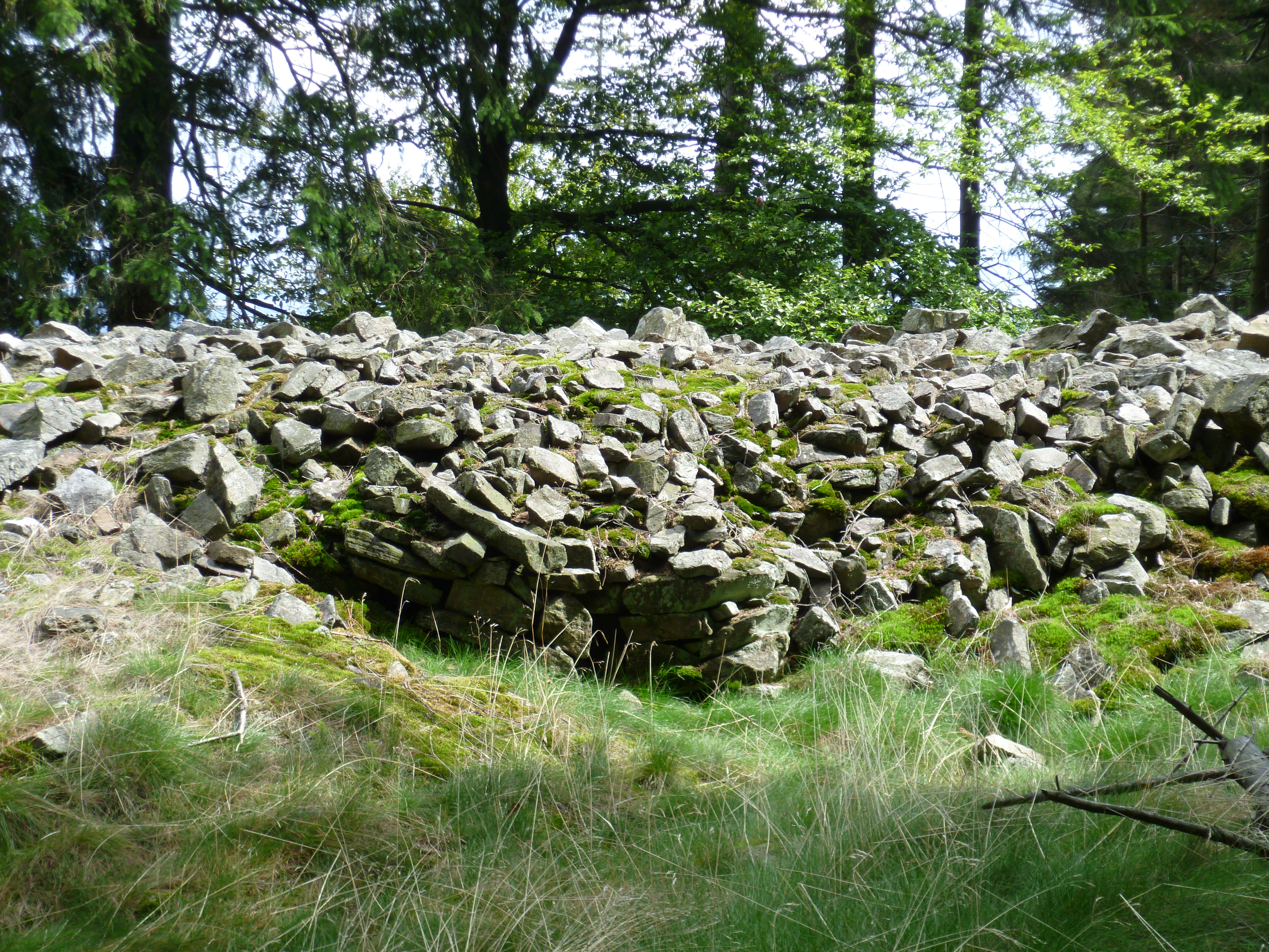 Minimale Reste eines Maueransatzes am Ringwall Altkönig